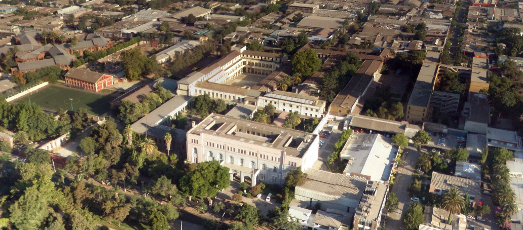 Internado Nacional